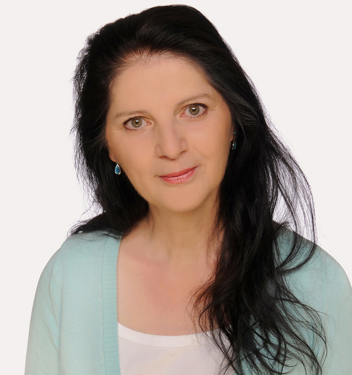 foto